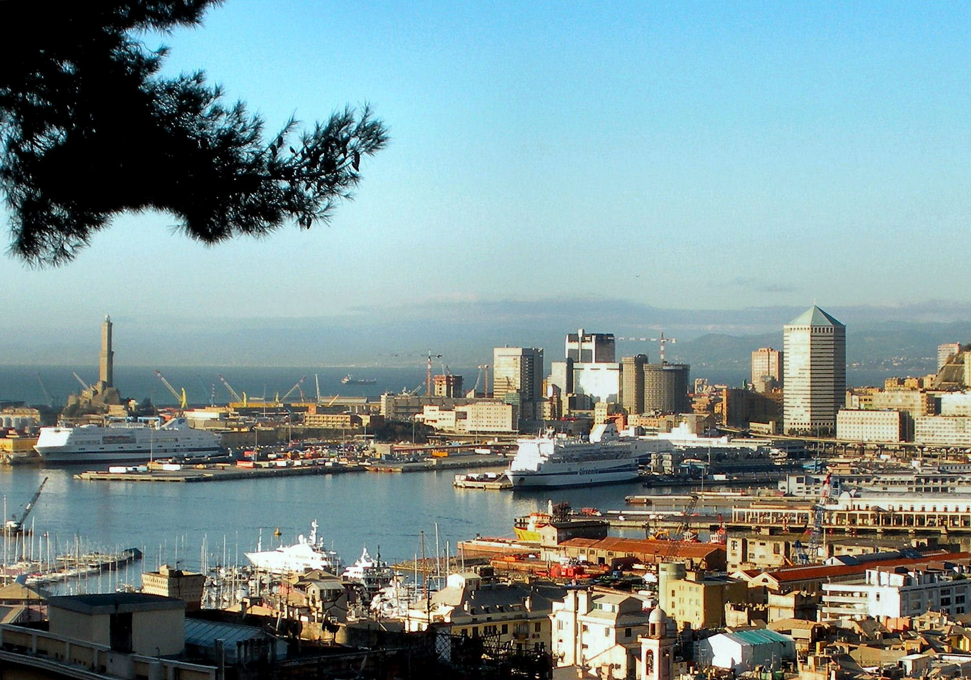 Genova, il centro direzionale di San Benigno visto dalla Spianata di Castelletto